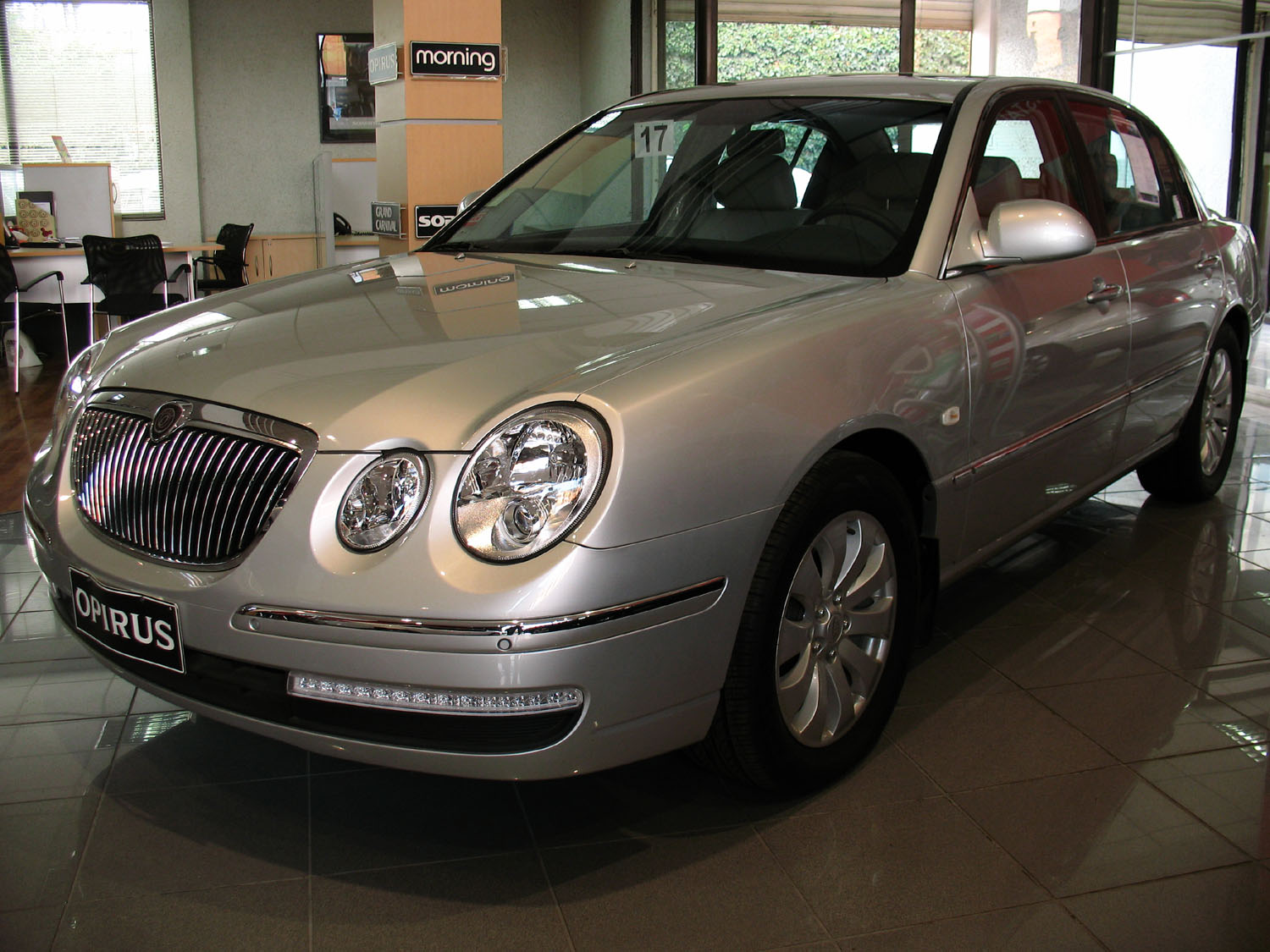 opirus 2009